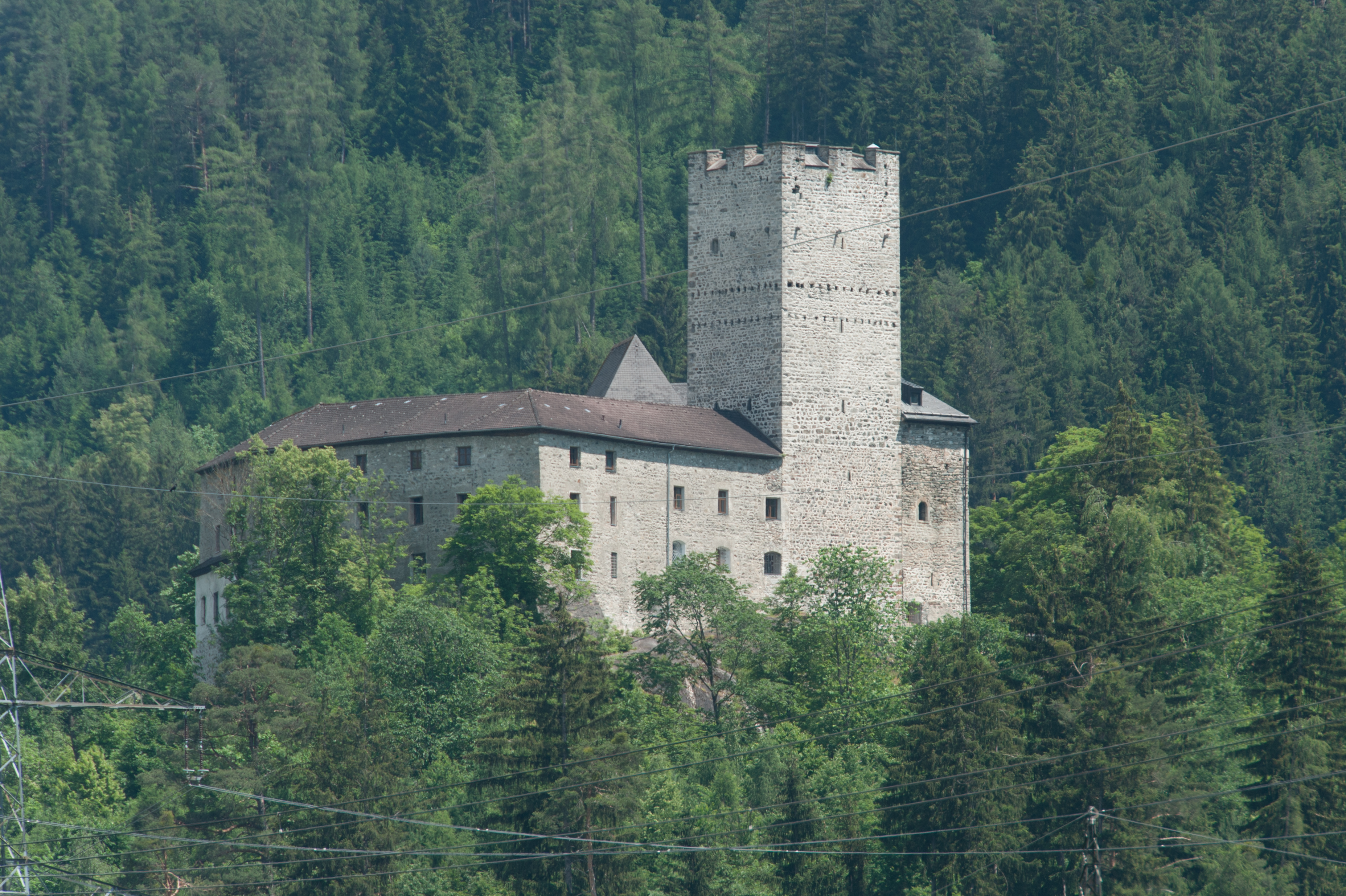 Wiki takes Nordtiroler Oberland: Burg St. Petersberg